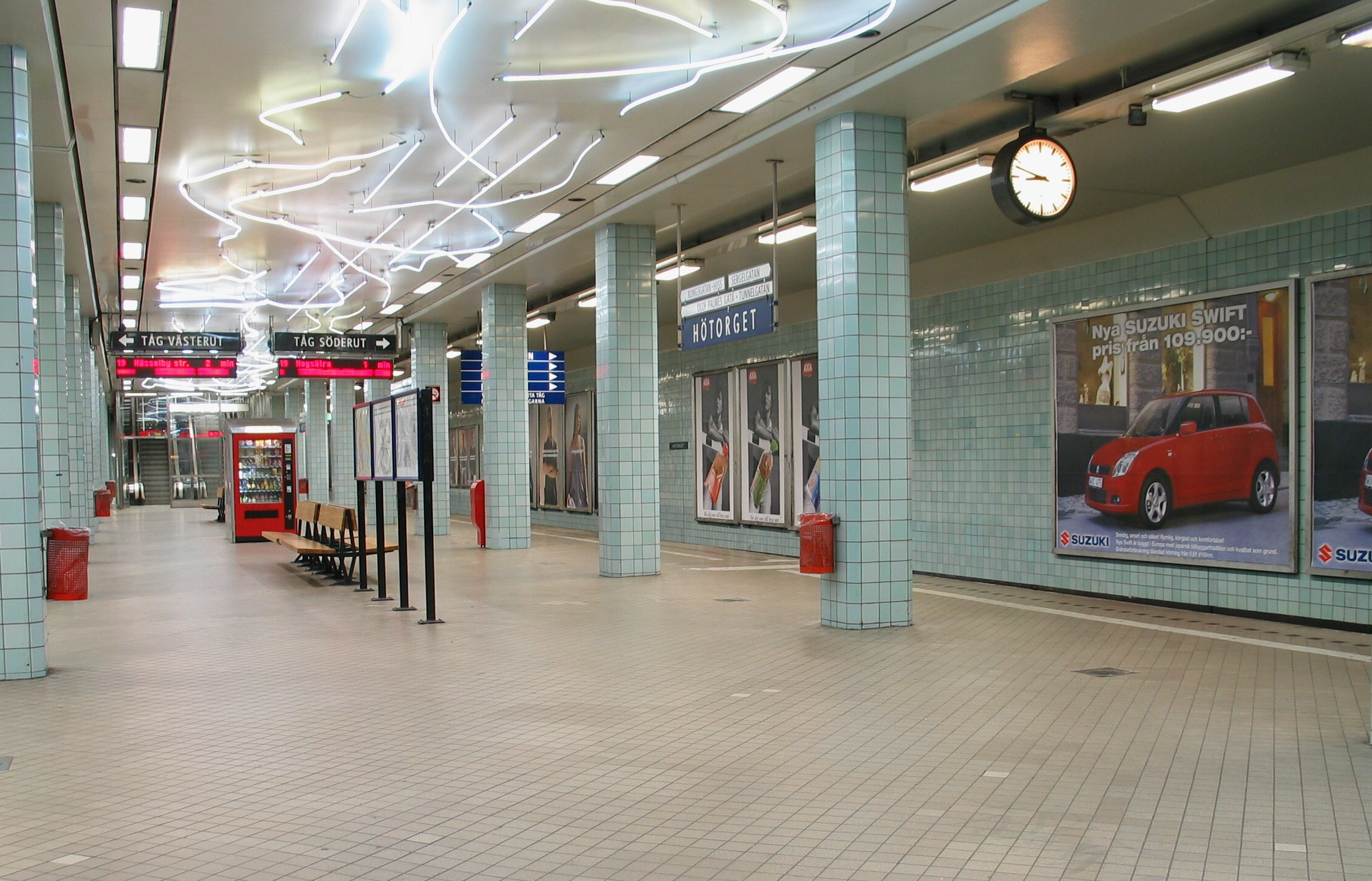 Hötorget, a metro station in Stockholm, Sweden.